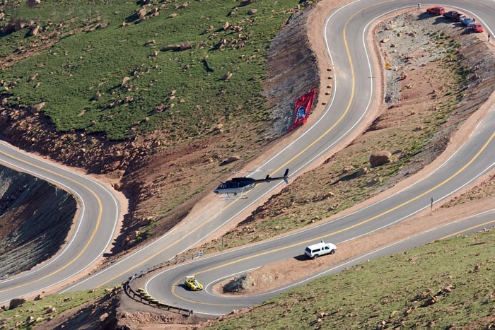 Randy Schranz Peaks Peak 2007